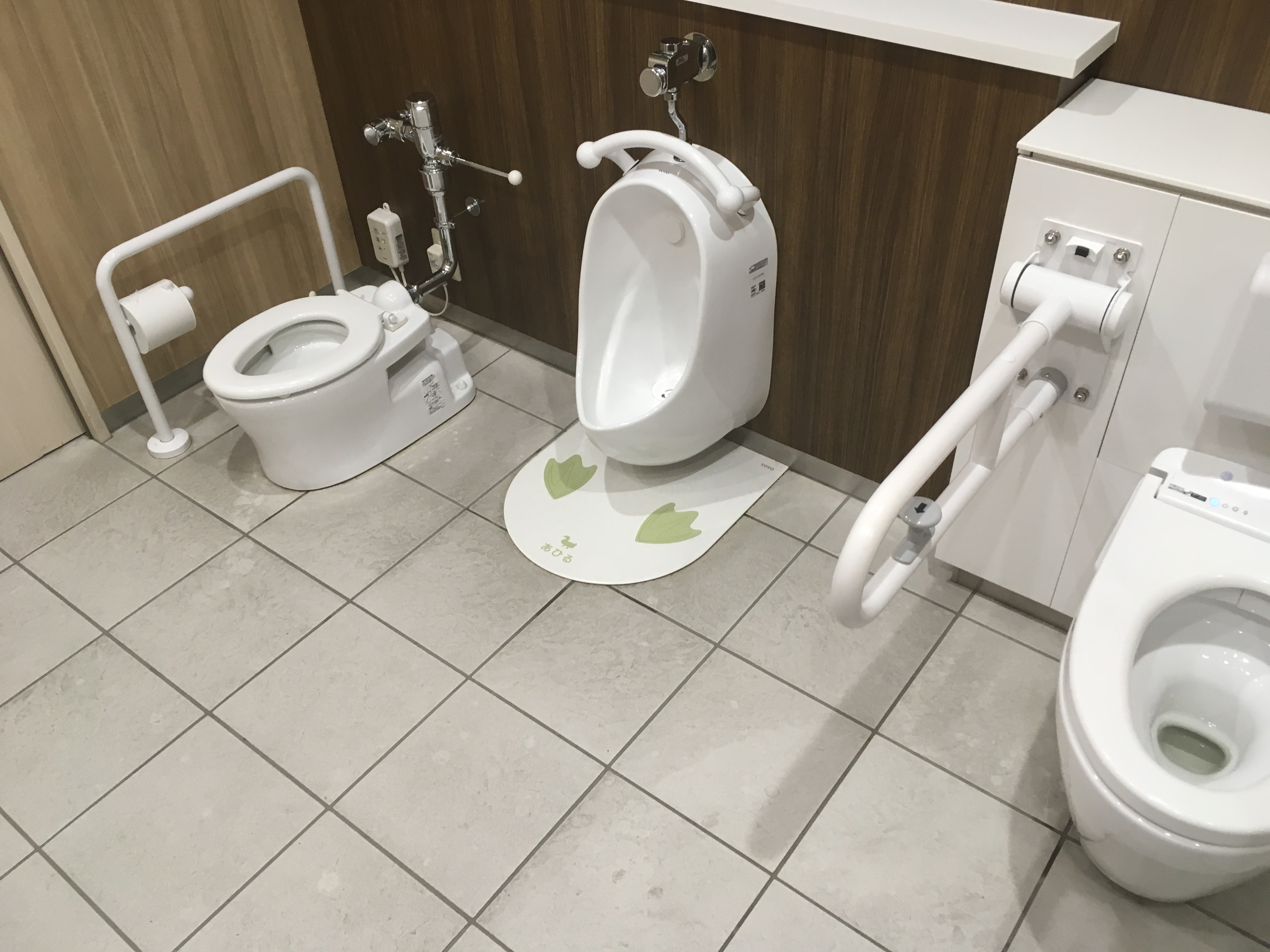 右から3－5歳児向け幼児用大便器、幼児用小便器、大人用便器